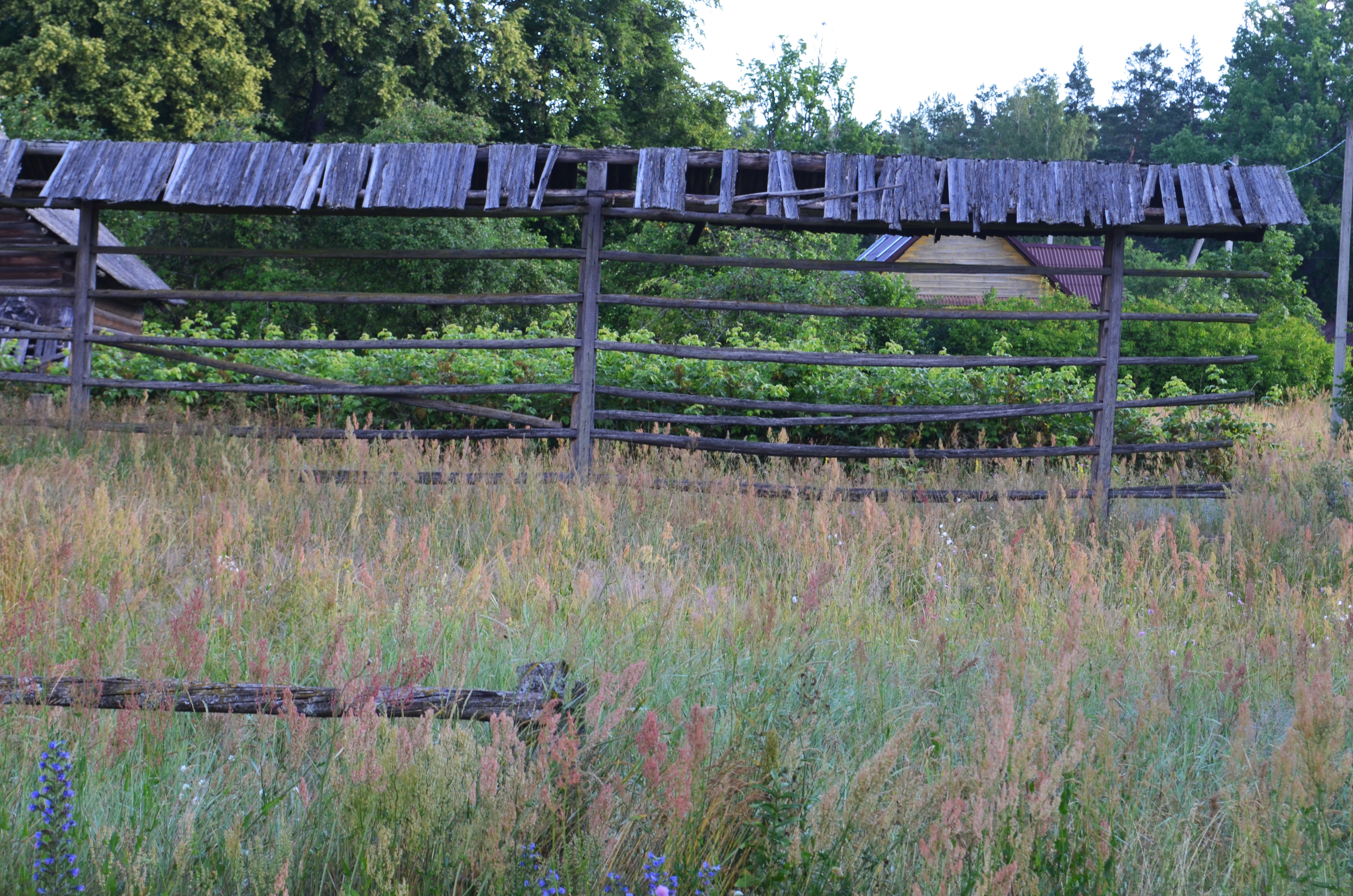 Žardas Musteikoje, Varėnos r.